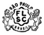 Um dos selos da Fábrica de Louças Santa Catharina